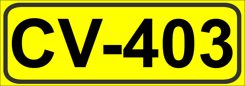 Inidcador de la Carretera de la Comunidad Valenciana CV-403